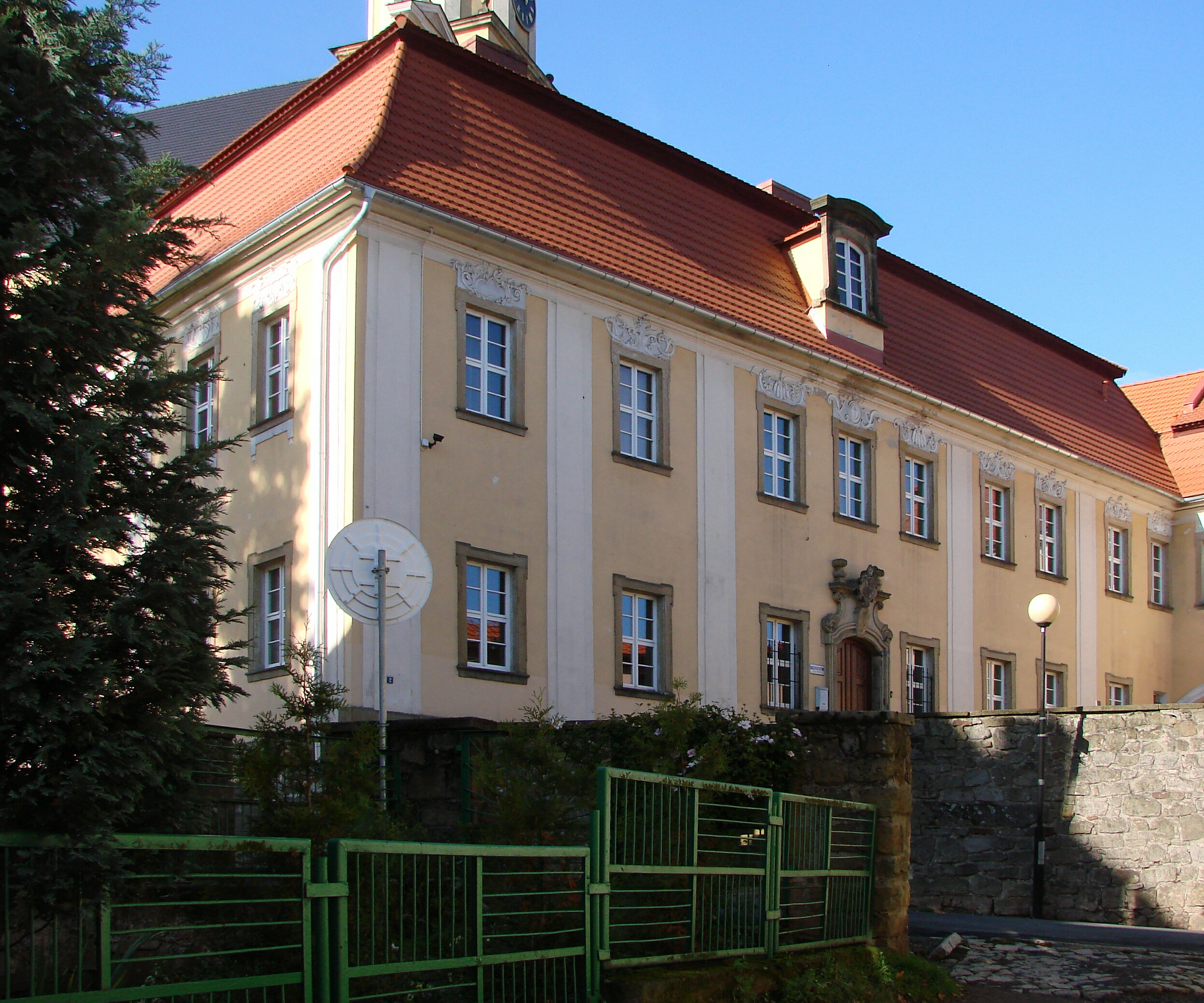 Chełmsko Śląskie, ul. Powstańców Śląskich 2 - plebania kościoła pw. św. Rodziny, 1727-1728